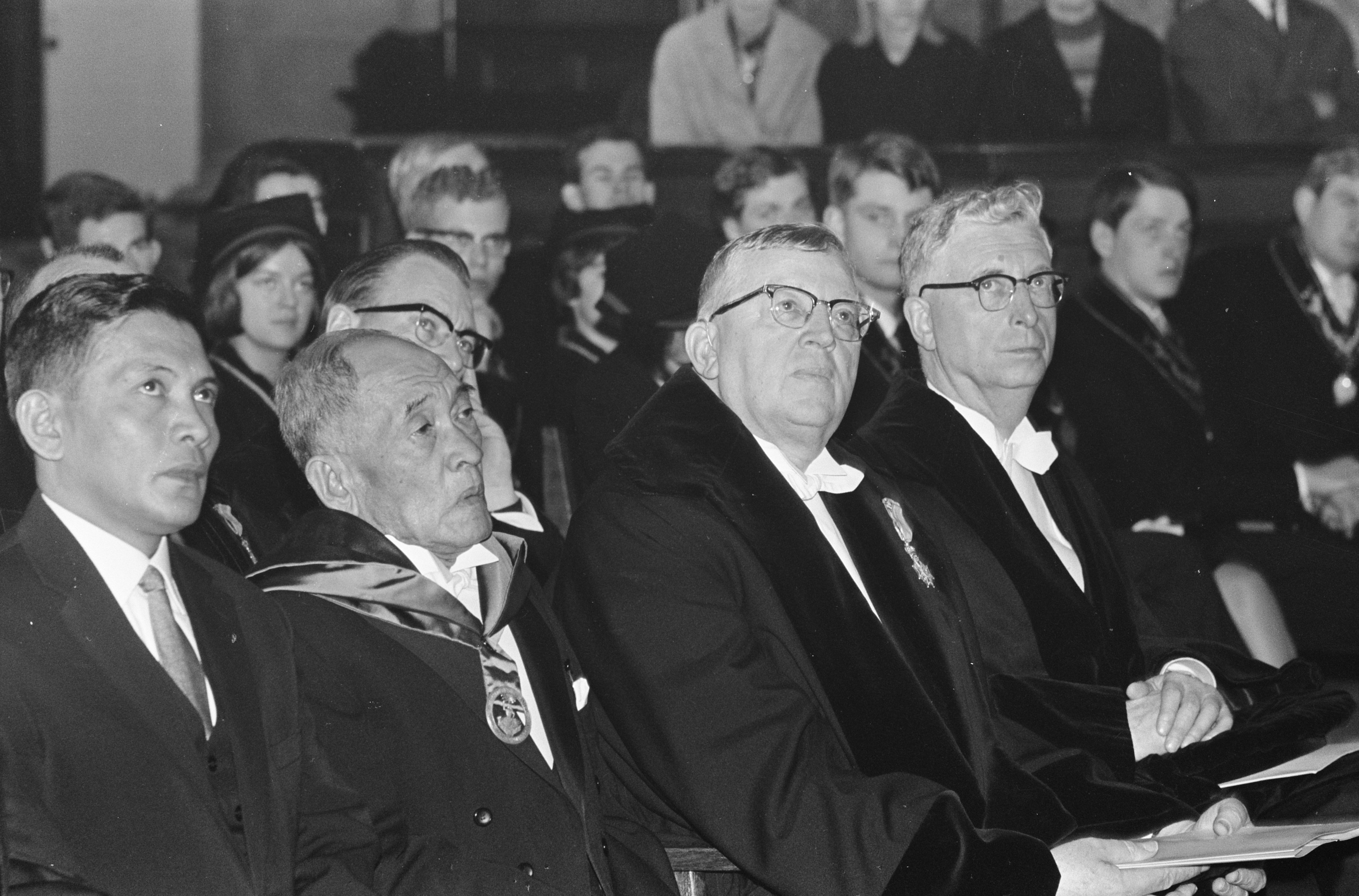 Collectie / Archief : Fotocollectie Anefo Reportage / Serie : Toekenning van eredoctoraat voor prof. dr. mr. T.S.G. Mulia in de Westerkerk te Amsterdam Beschrijving : V.l.n.r. de zoon van Mulia, Mulia, promotor prof. dr. Verkuijl en dr. Leendert Algera Annotatie : Todok Sutan Gunung Mulia (1896-1966) was van 1945-1946 minister van Onderwijs in het kabinet Sjahrir. Hij was mede-oprichter van de Partai Kristen Indonesia en uitgever. Hij stierf kort na deze uitreiking Datum : 20 oktober 1966 Locatie : Amsterdam, Noord-Holland Trefwoorden : eredoctoraten, hoogleraren, kerken, onderscheidingen, universiteiten Persoonsnaam : Mulia, T.S.G., Verkuyl, Johannes, algera, L. Instellingsnaam : Westerkerk Fotograaf : Fotograaf Onbekend / Anefo Auteursrechthebbende : Nationaal Archief Materiaalsoort : Negatief (zwart/wit) Nummer archiefinventaris : bekijk toegang 2.24.01.05 Bestanddeelnummer : 919-7039